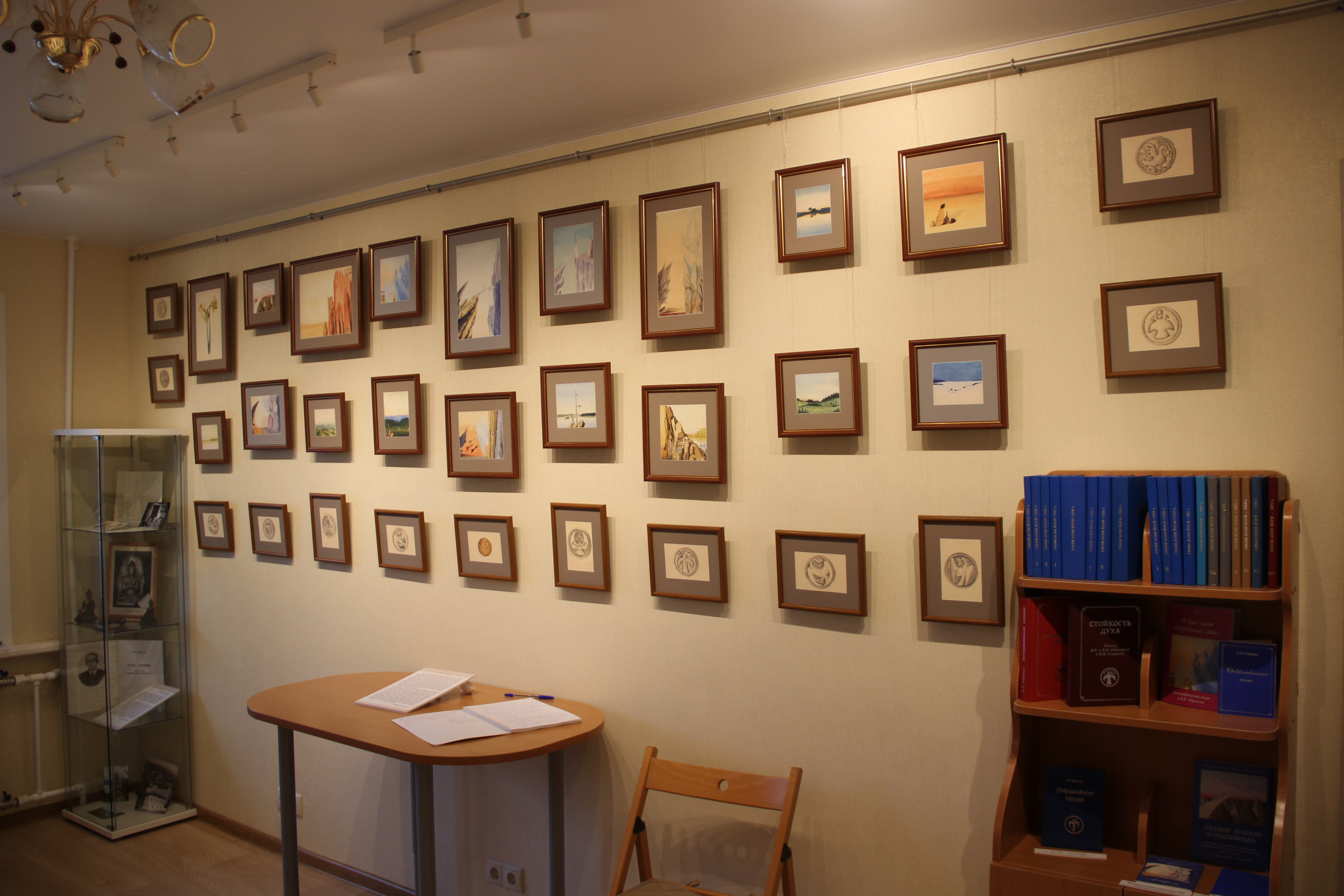 Музей Б. Н. Абрамова в г. Венёве. Репродукции акварелей Б. Н. Абрамова. 2017 г.